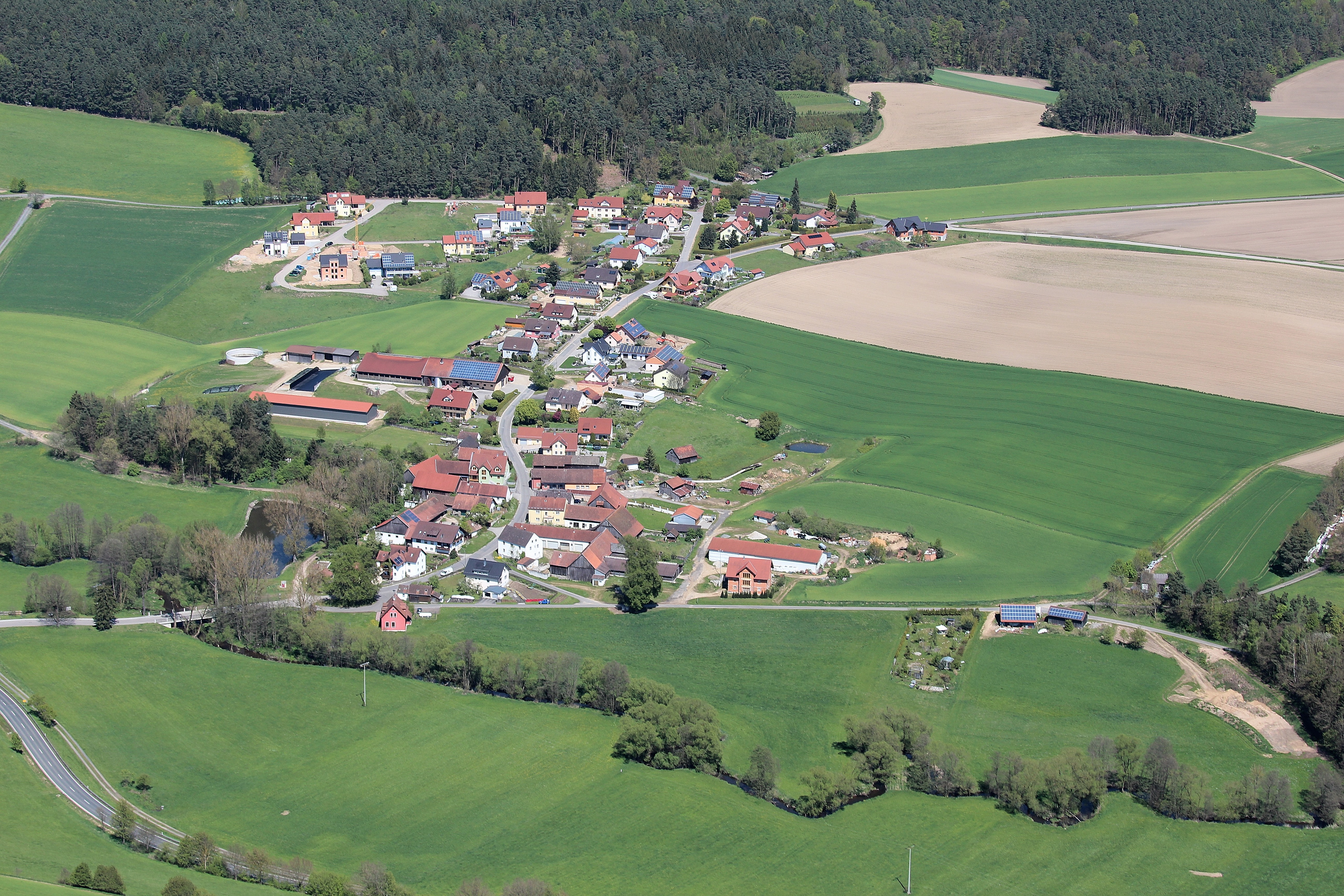 Mitteraschau, Stadt Neunburg; Landkreis Schwandorf, Oberpfalz, Bayern